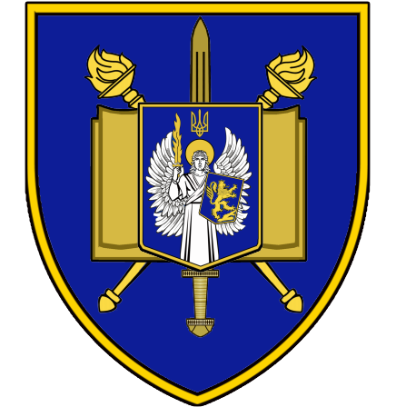 Це новий нарукавний знак, розроблений та впроваджений восени 2018 року.